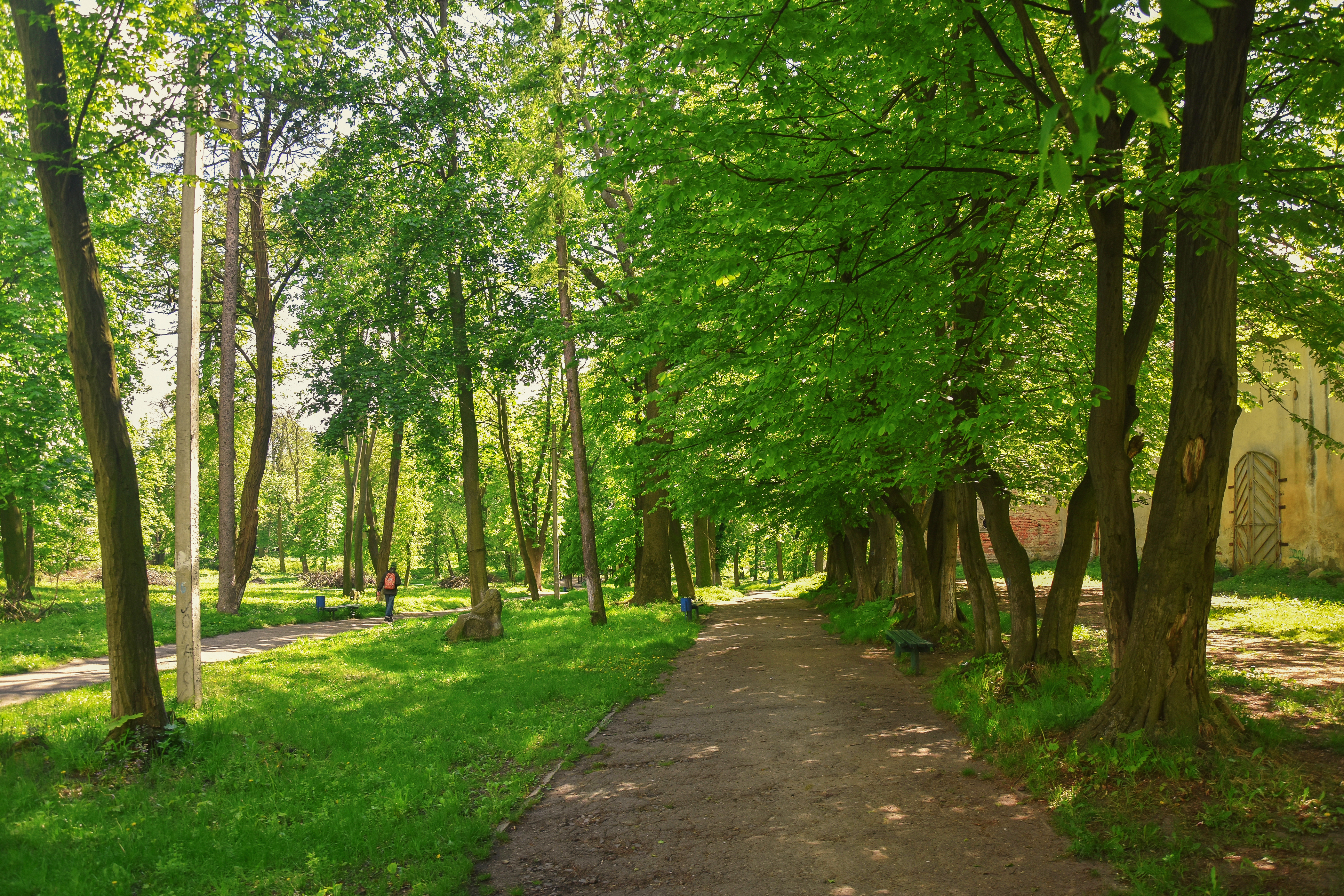 Замковий парк, Жовківський р-н, м. Жовква